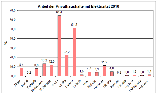 Anteil der Privathaushalte mit Elektrizität in den Sucos von Oecusse 2010.